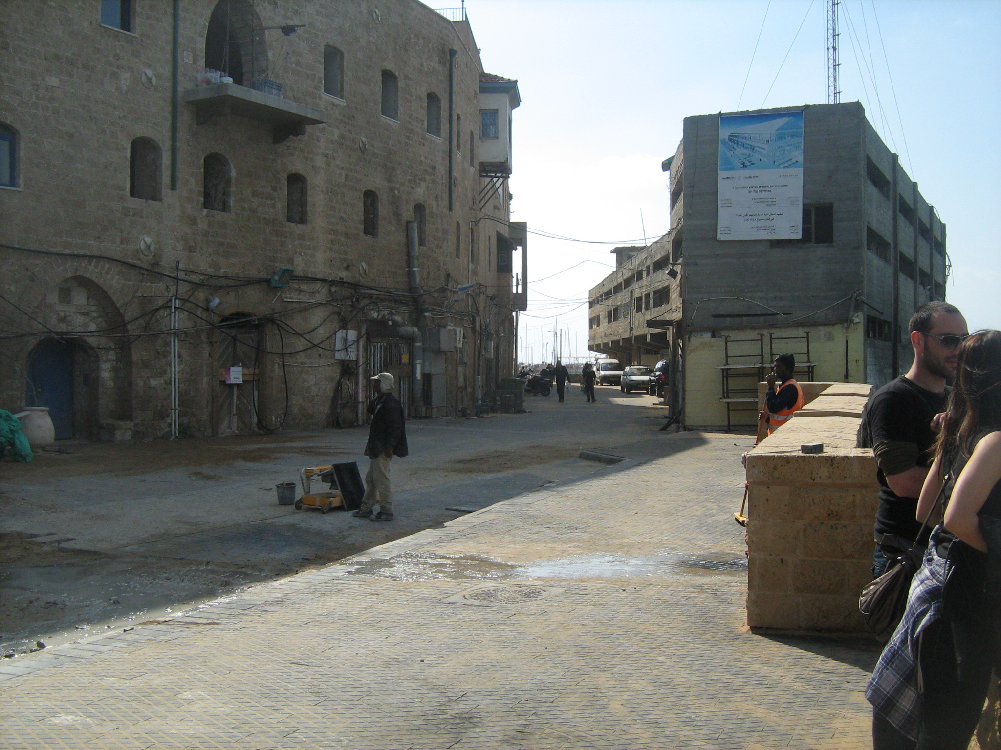 נמל יפו